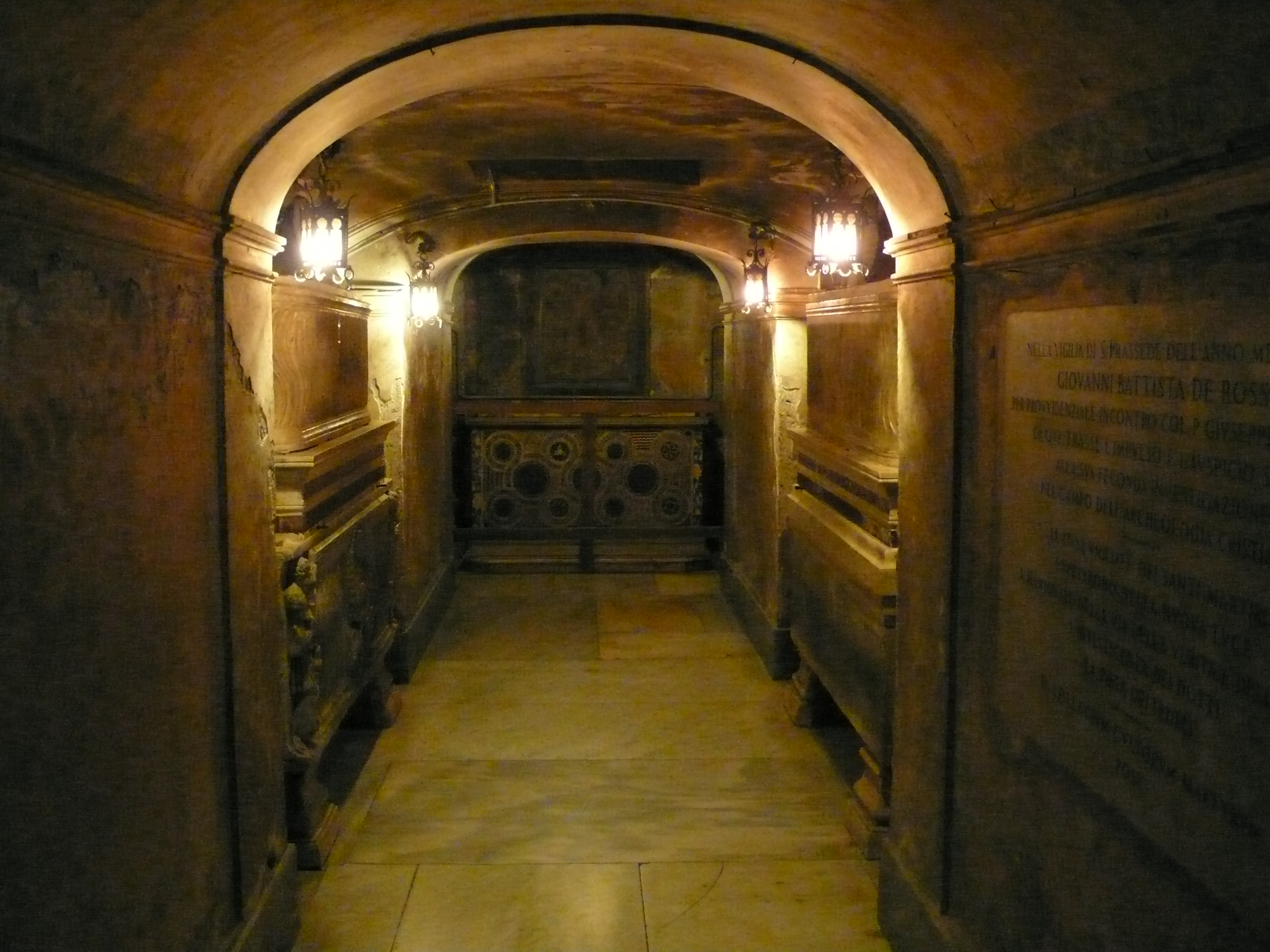 Santa Prassede, Rom; Krypta